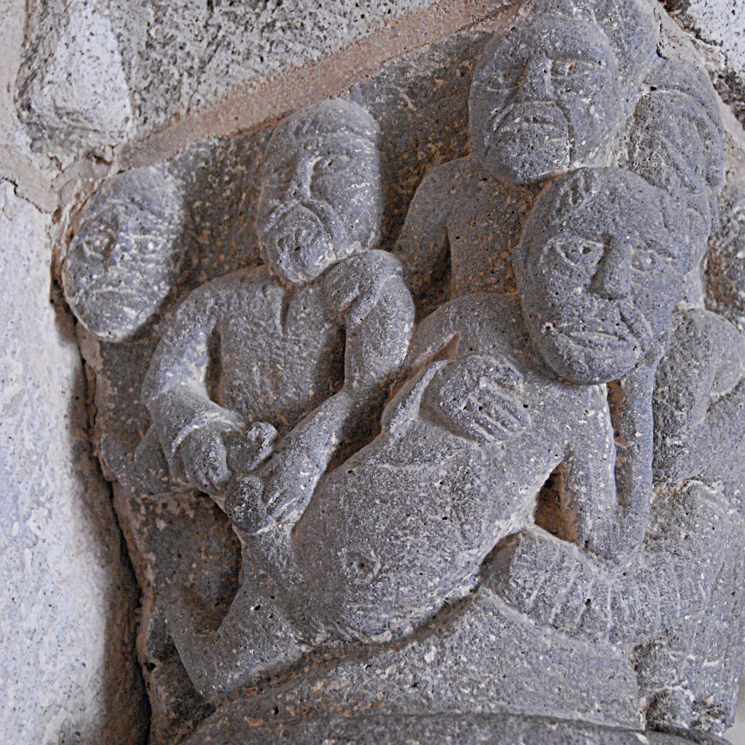 Chambon-sur-Lac, Friedhofskapelle, Kapitell,9 Männer,Detail links außen